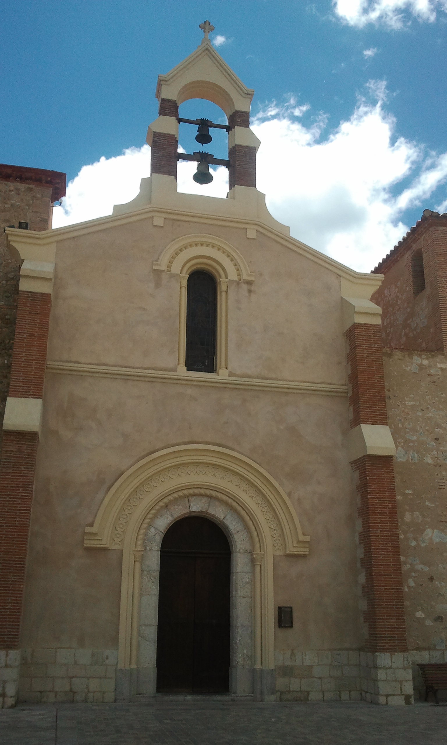 Façade de l'église de Sainte-Marie